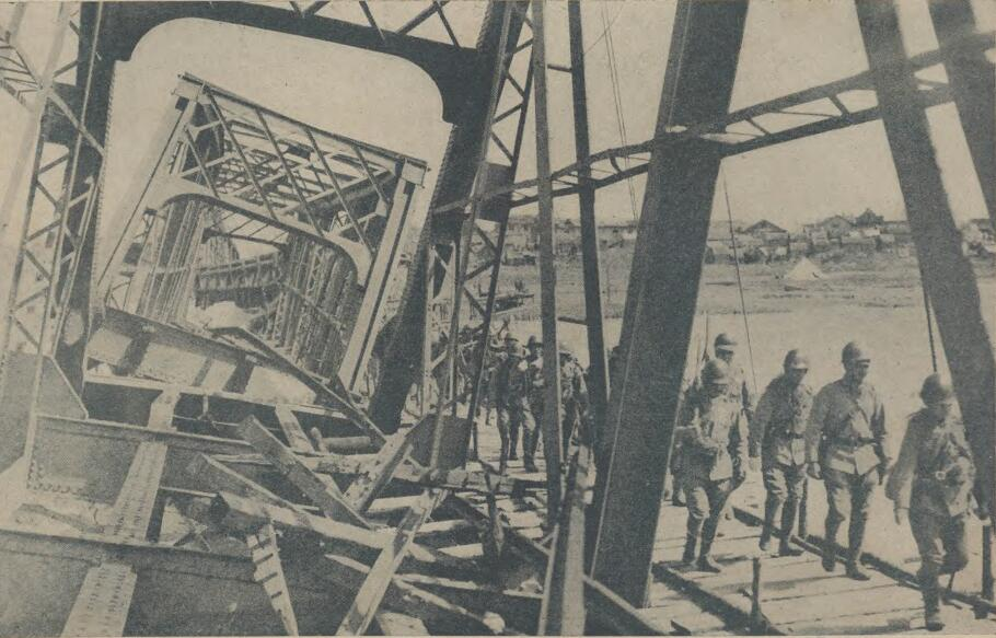 题名： 今日之黄河及淮河两大铁桥:(八幅照片) 文献来源： 《大美画报》 出版时间： 1938 年 卷期(页)： [ 第3期 ，2页 ]